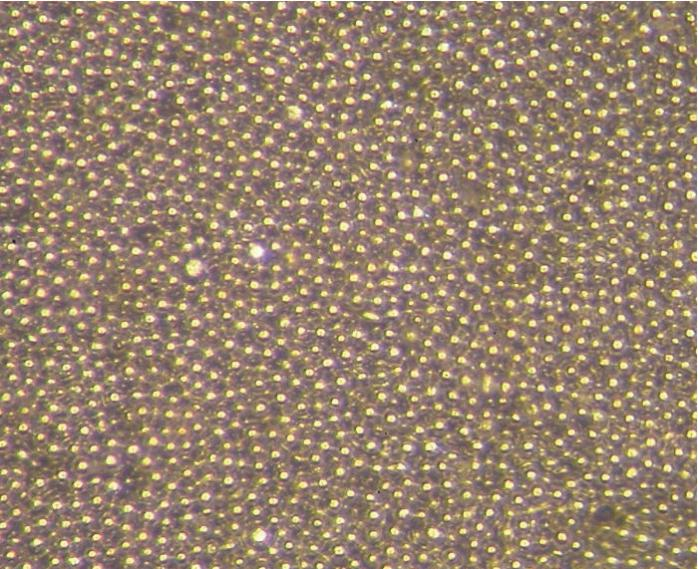 Bild von Lotpaste erstellt von Martin Maier